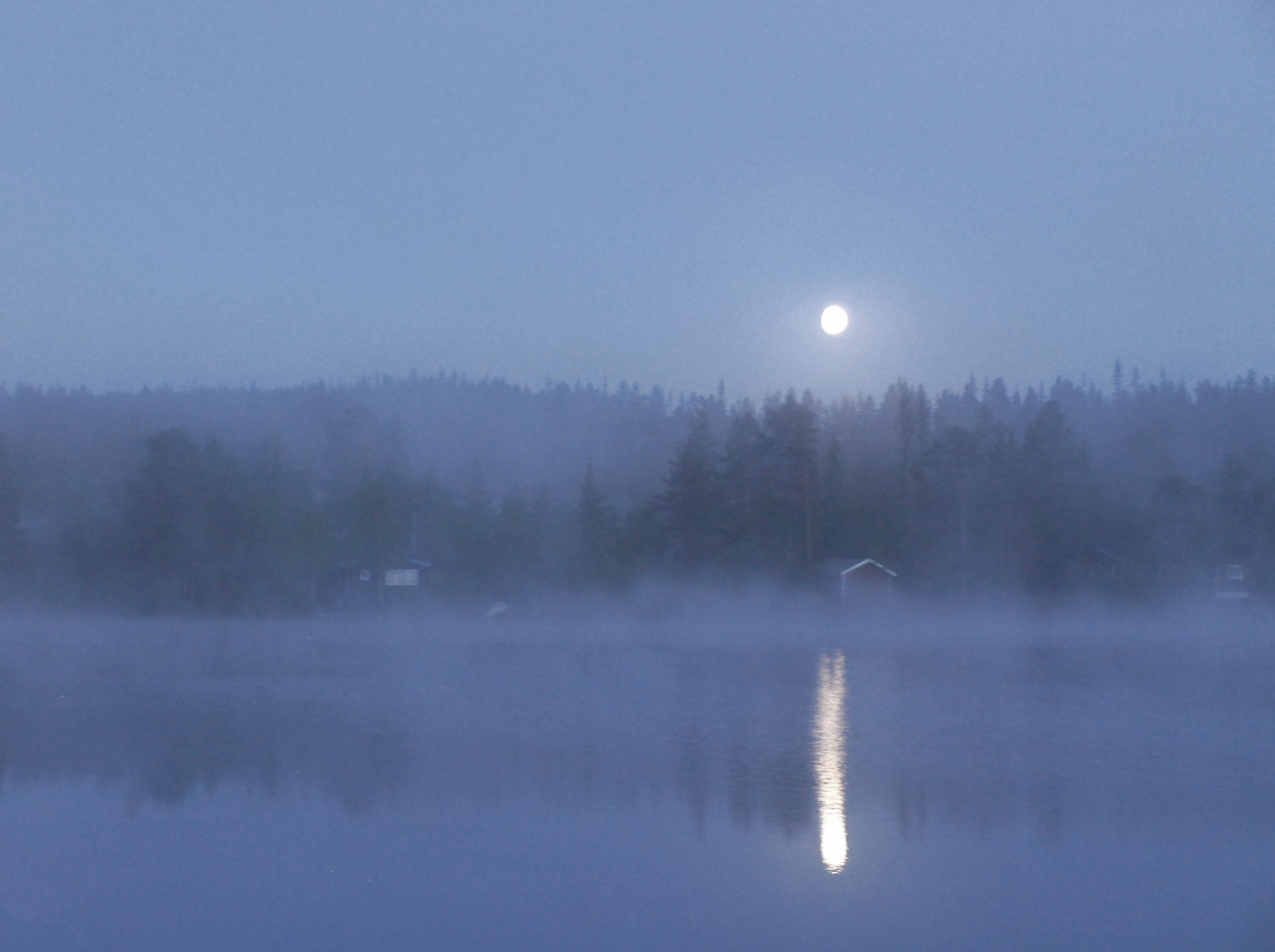 Bildet er tatt ssv utover Tonsvatnet (Tonsvann). Vatnet ligger på grensen mellom Nord-Aurdal, Sør-Aurdal og Etnedal i Oppland fylke. Området er kjent for kampene under den andre verdenskrig.